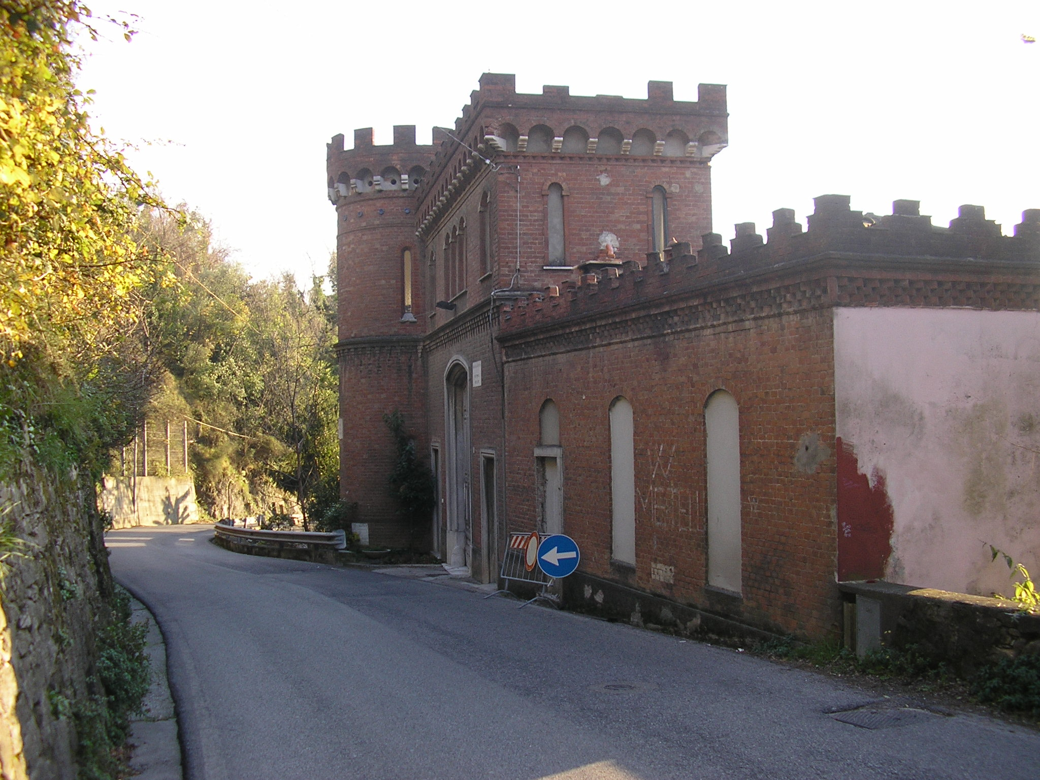 foresteria della Villa Fabbricotti a Montia